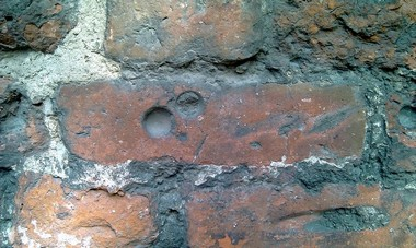 Znak na cegle elbląskiej świątyni gotyckiej.